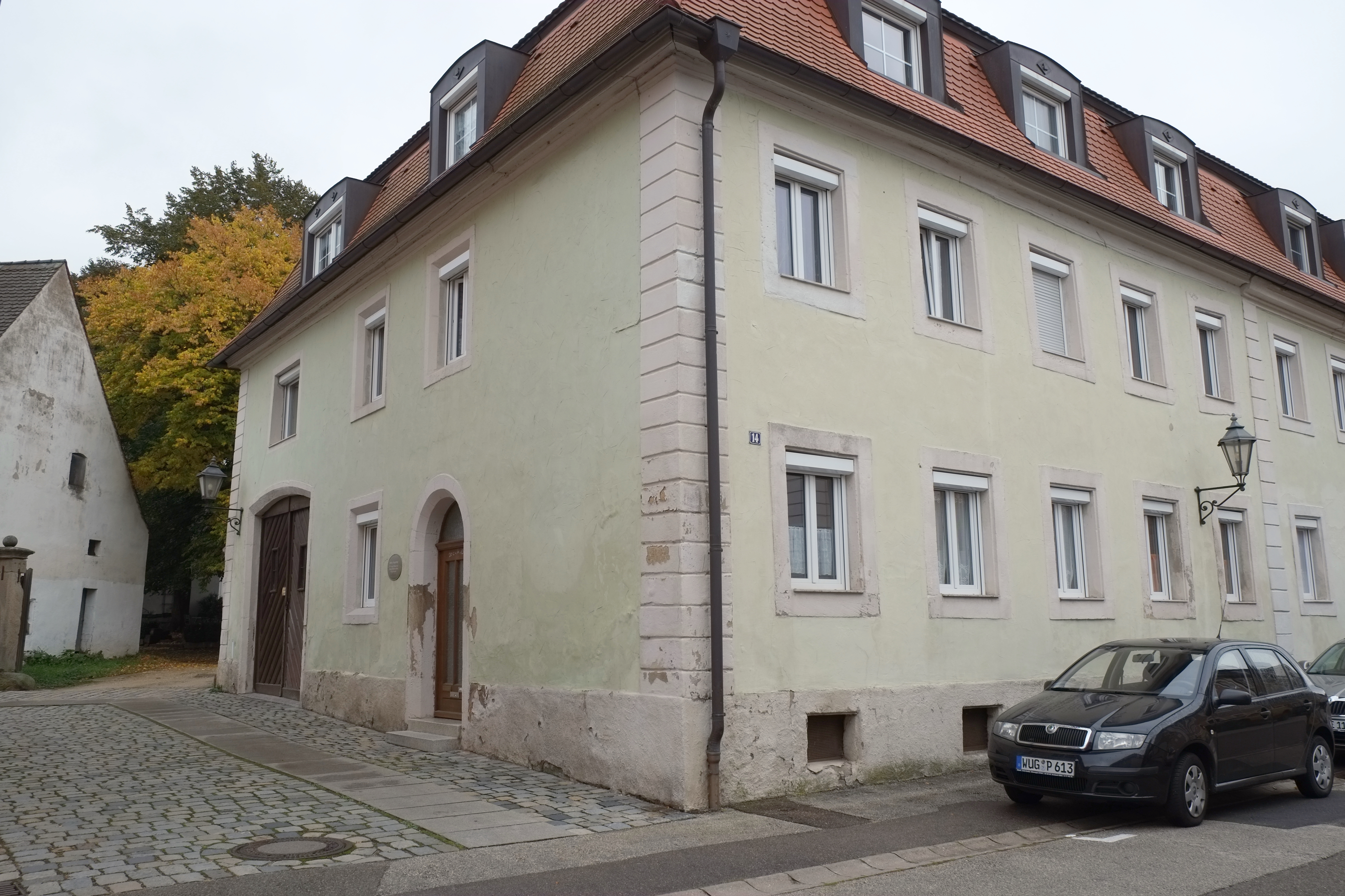 Ehemalige Synagoge in der Neuen Gasse 14 in Ellingen im Landkreis Weißenburg-Gunzenhausen (Bayern)